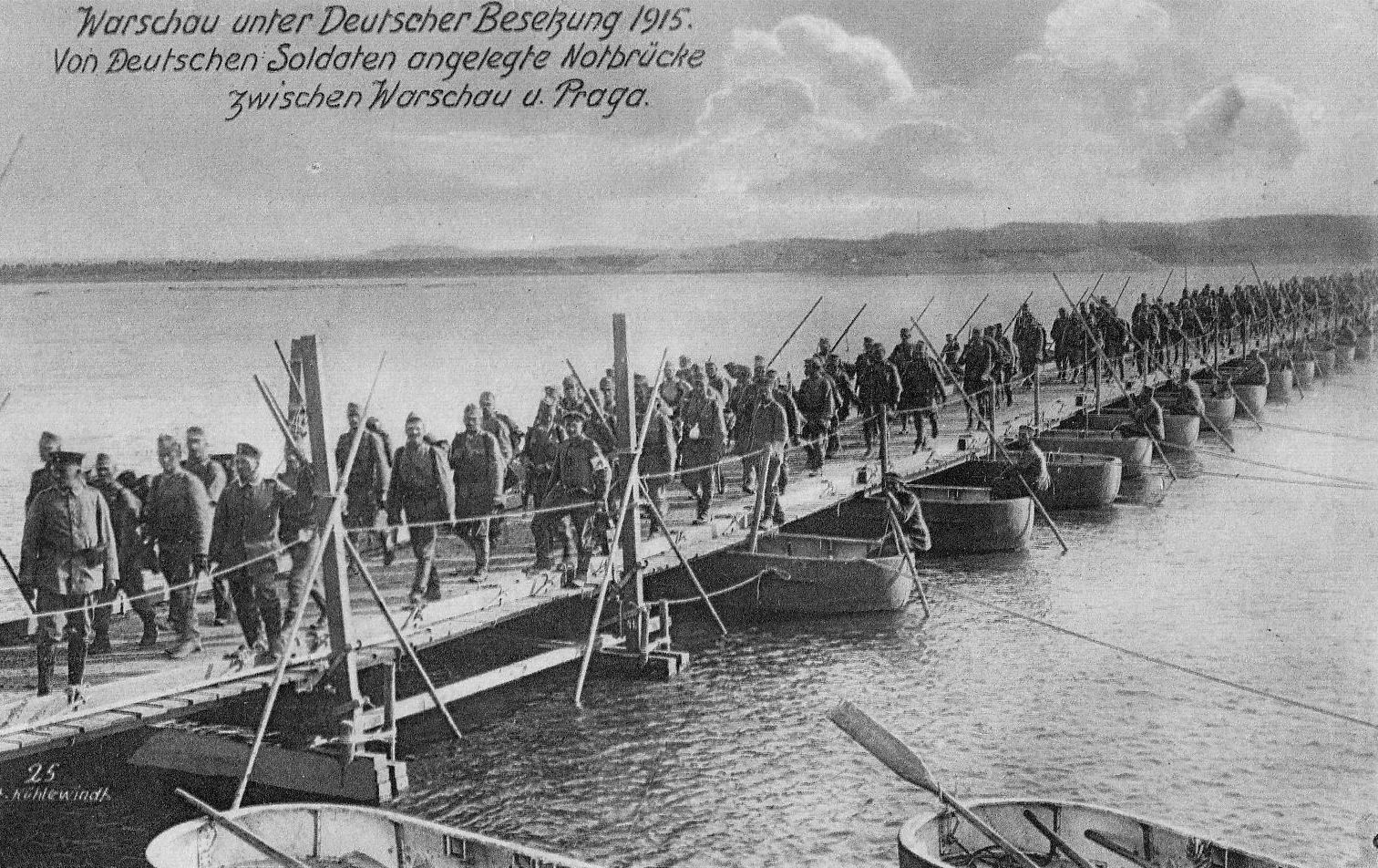 Most pontonowy zbudowany przez wojska niemieckie na Wiśle w Warszawie